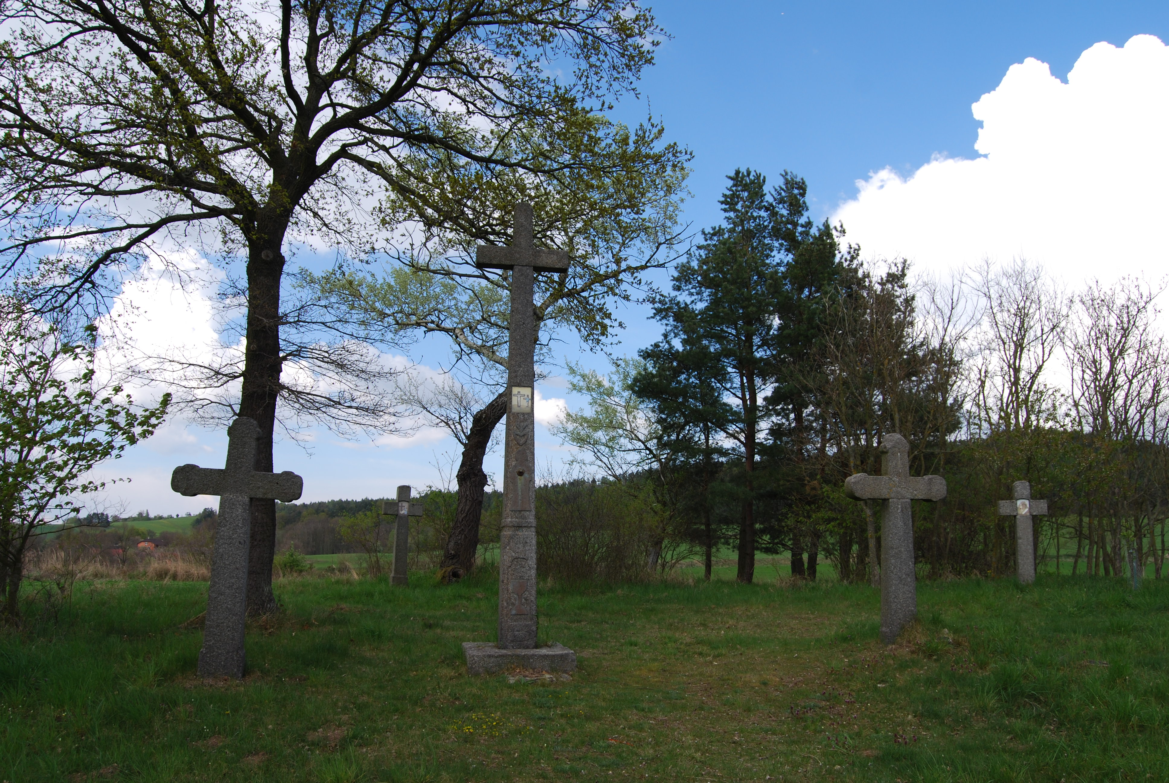 Jednotlivá zastavení křížové cesty na vrchu Kalvárie. Jesenice (okres Příbram). Česká republika.